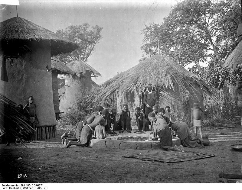 Konde-Unterland. Am Dorfmahlstein, Landschaft Usangi